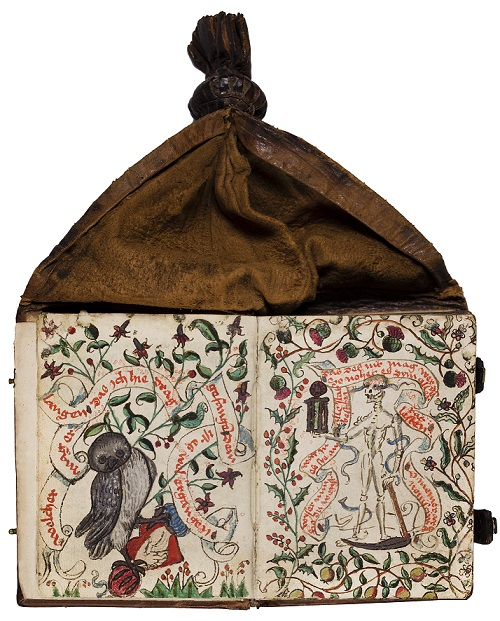 Beutelbuch - Gebetbuch der Katharina Roeder von Rodeck, Frauenalb, 1540 Karlsruhe, Badische Landesbibliothek, Cod. K 3356; vorher Schweinfurt, Sammlung Otto Schäfer, OS 1233